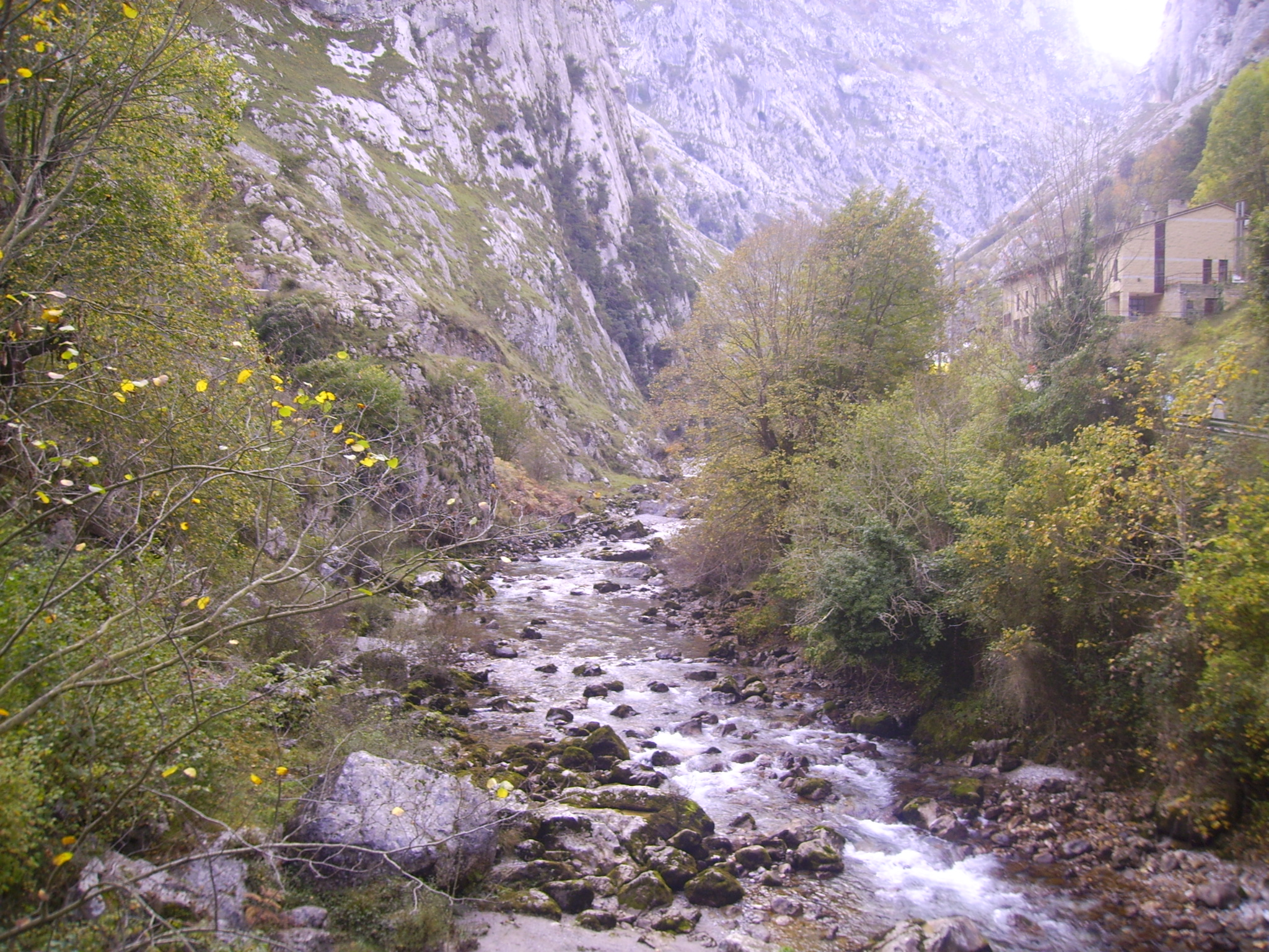 Fotografía que ilustra el tramo inicial de la garganta del Río Cares, a su paso por la entrada del funicular de Bulnes, Asturias, España.